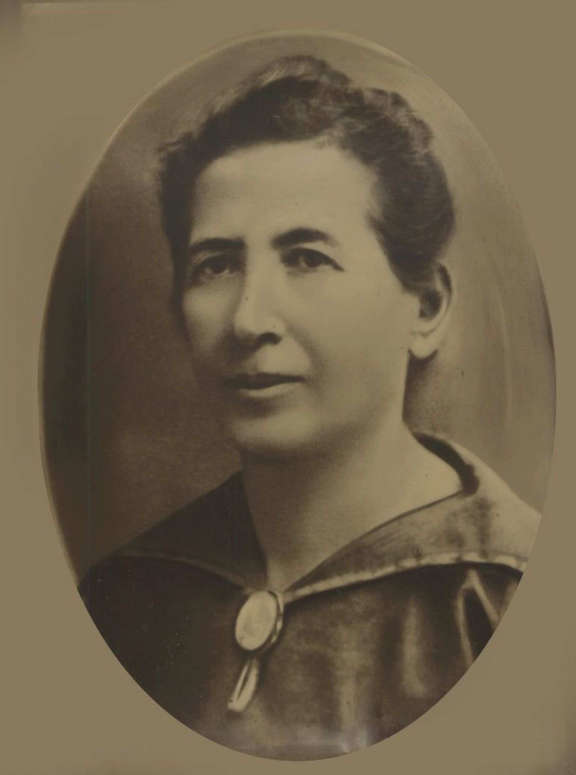 נחמה פוחצ'בסקי, סופרת ארצישראלית.